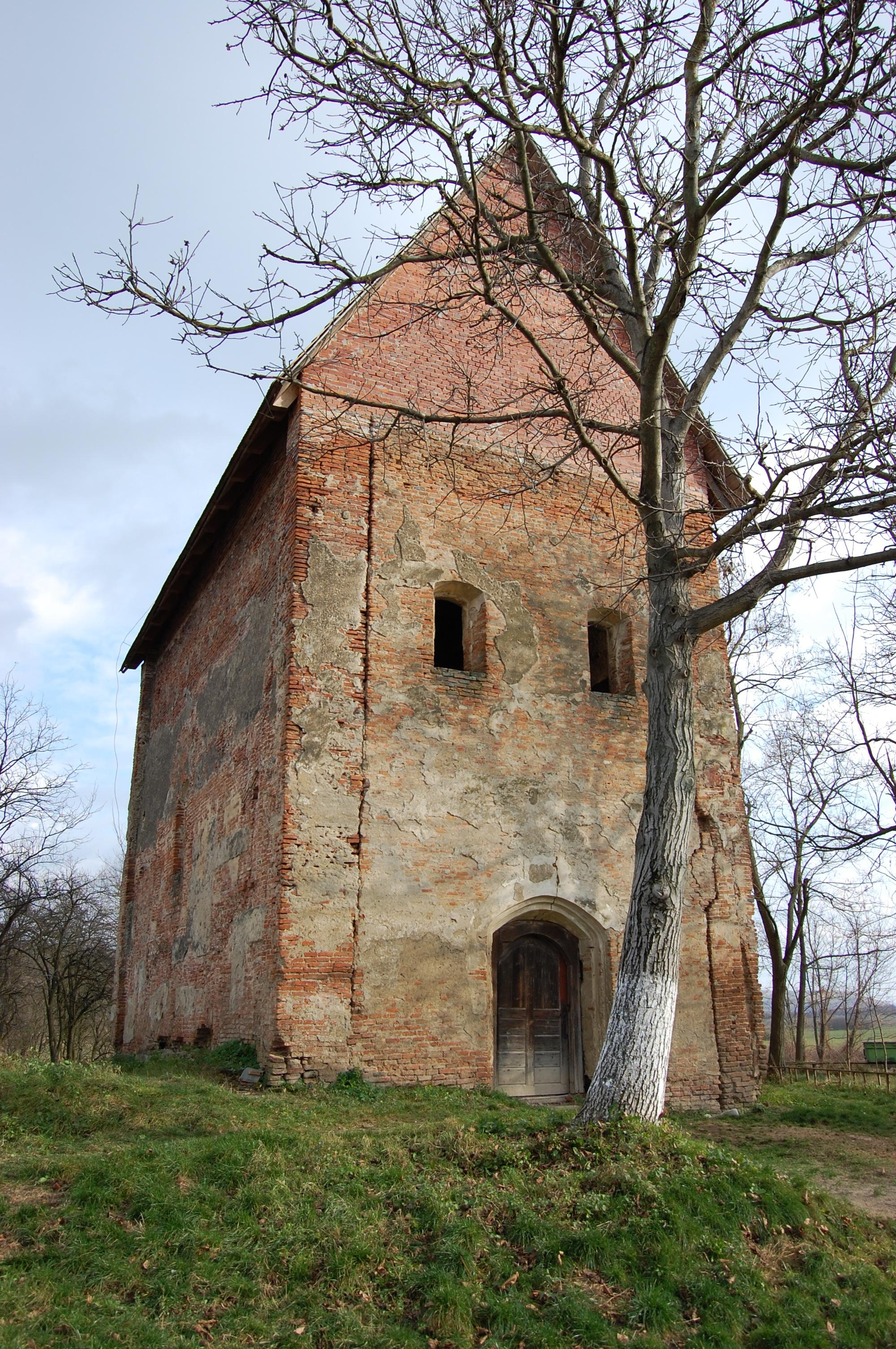 Érábrány - Premontrei rendű monostortemplom - XIII. sz. eleje